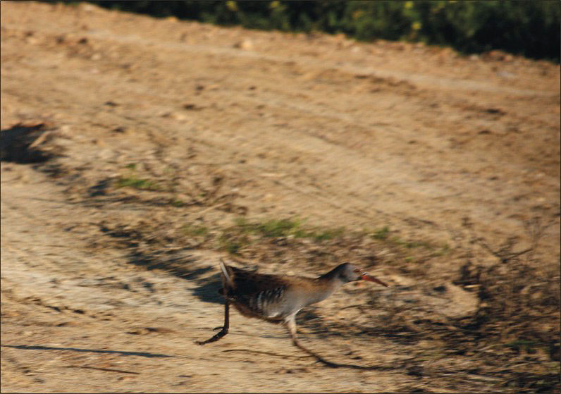 Fotografia realizada en los Arrozales de las Vegas Altas del Guadiana (Villanueva de la Serena, España)